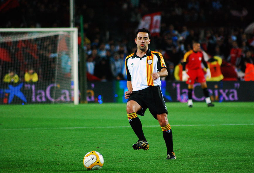 Xavi, amb la selecció de Catalunya, en un partit contra Argentina.